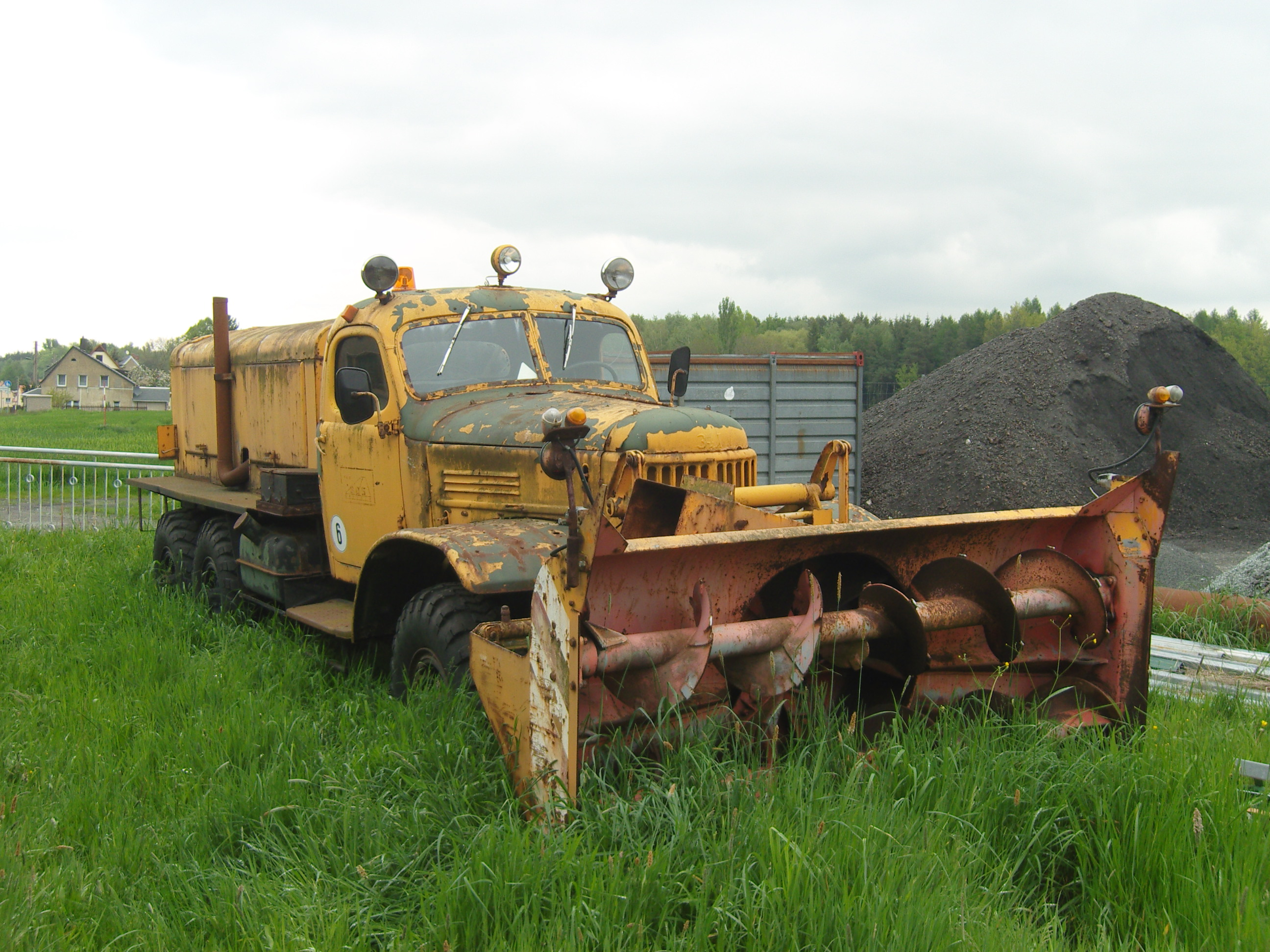 Schneefräse D-470 auf ZiL-157 im Frühling